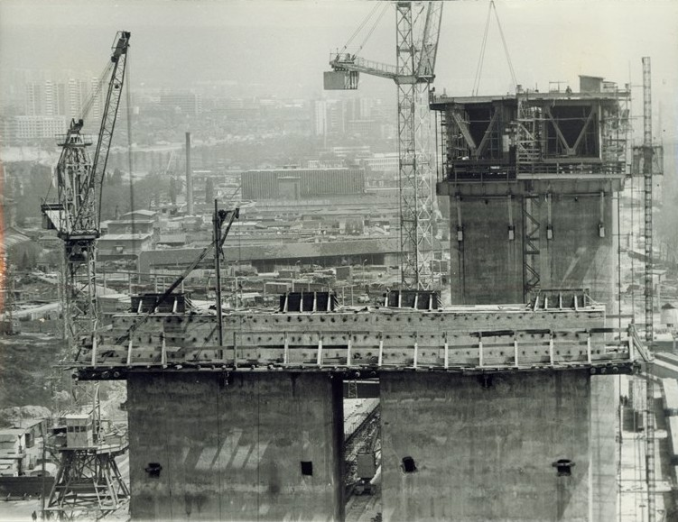 Построяването на Аспарухов мост, над канала, свързващ Черно море и Варненското езеро.